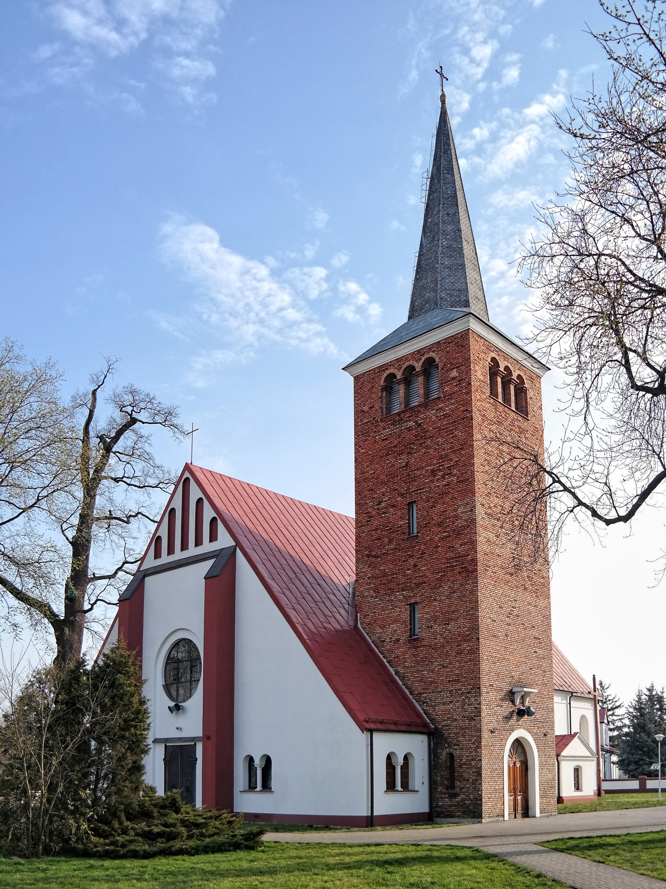 Kościół Świętego Wojciecha Biskupa i Męczennika w Sieradzu.